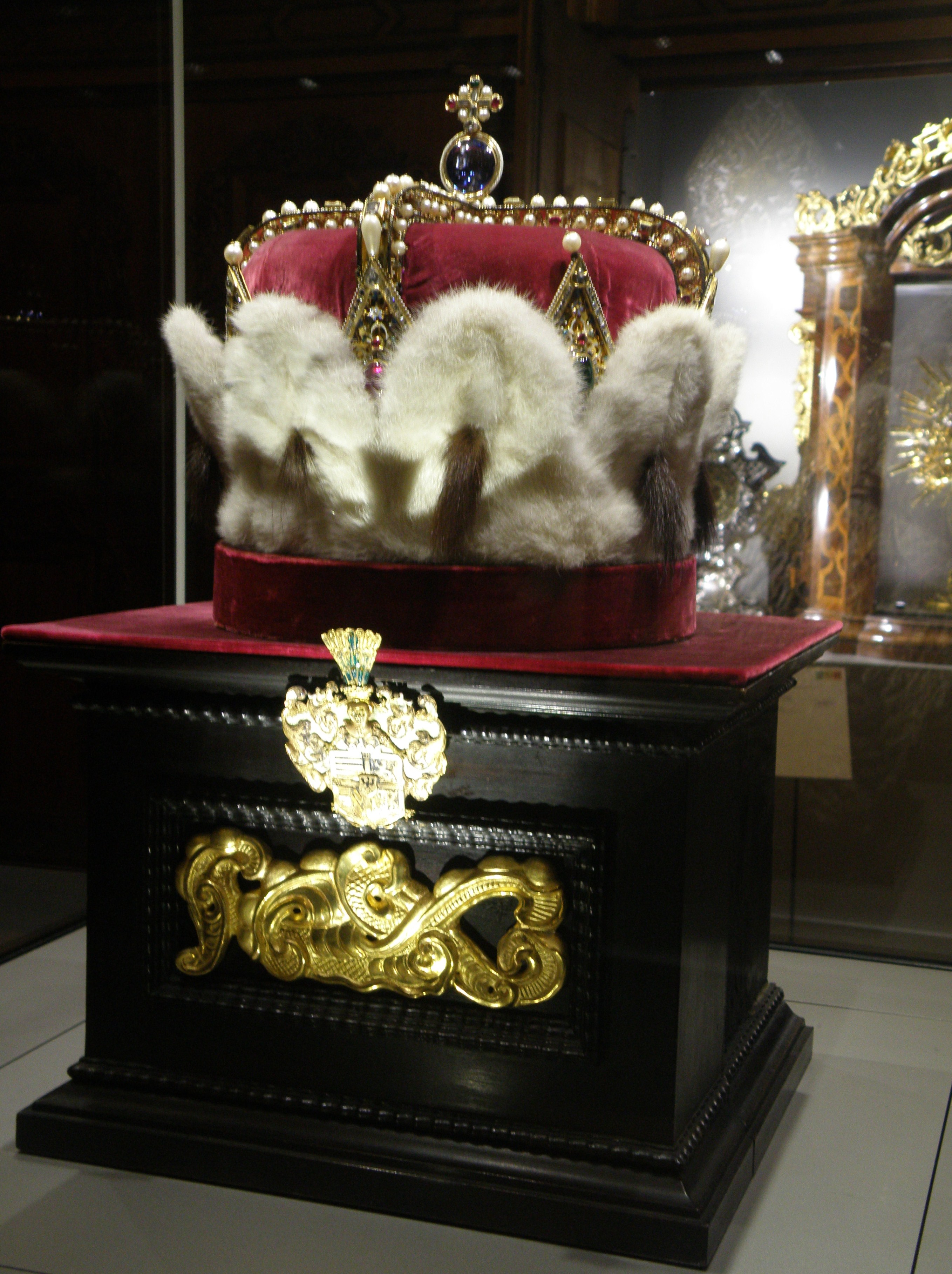 Schatzkammer im Augustinerchorherrenstift Klosterneuburg